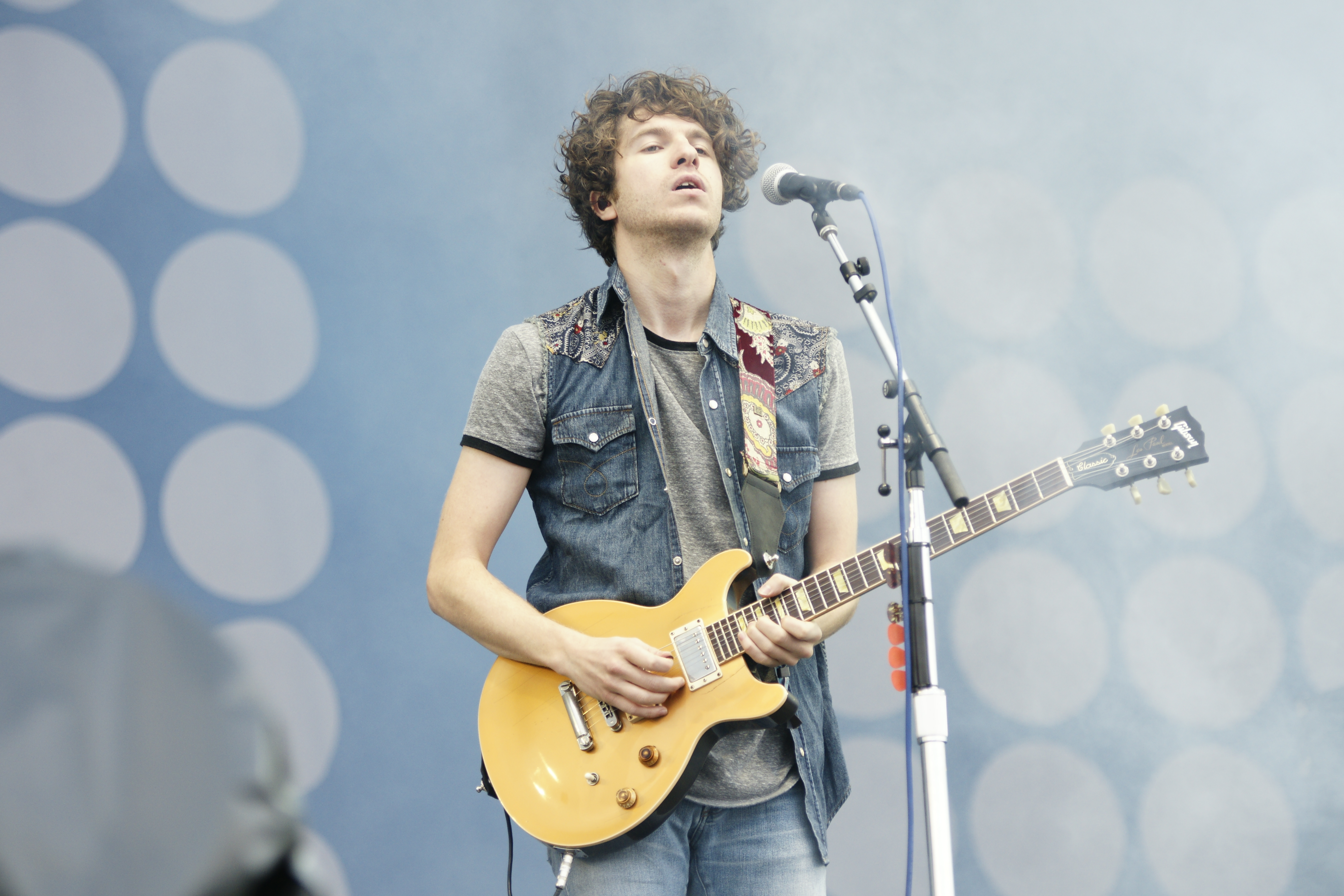 Deichbrand 2015 Festivalgelände Seeflughafen Nordholz